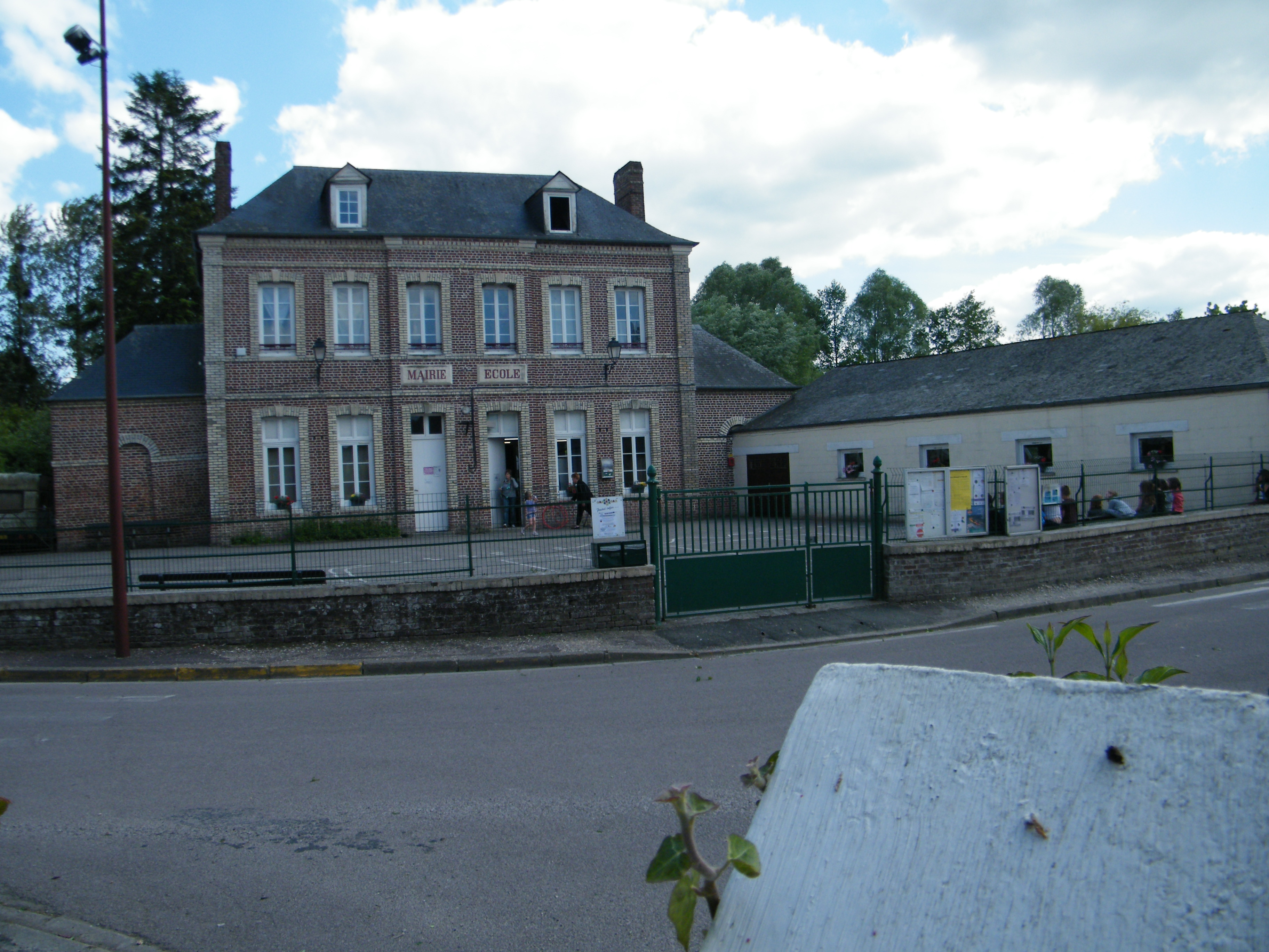 Mairie-école.